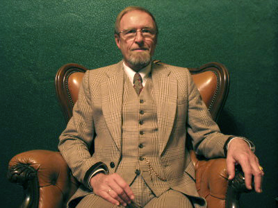 Prof. Dr. Dr. Eberhard Demm